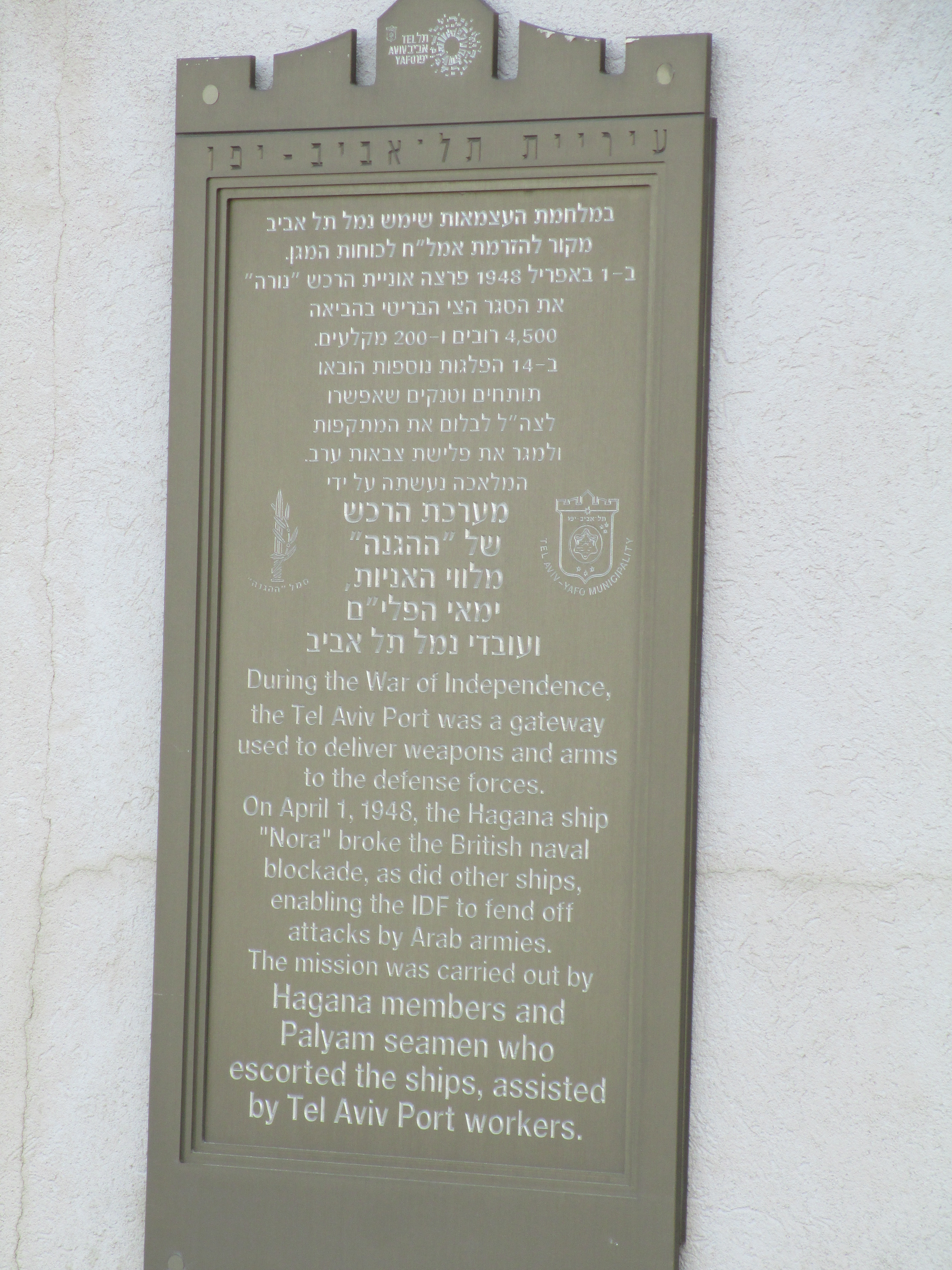 לוחית זיכרון בנמל תל אביב להגעת אוניית הרכש "נורה" עם נשק במלחמת העצמאות